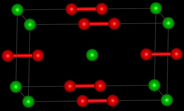 bariumperoxide structuur